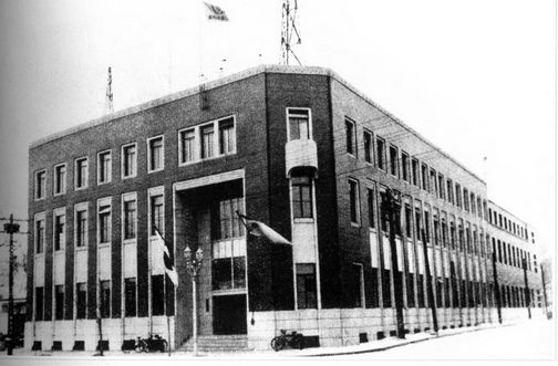 Manchukuo news agency（满洲国通信社）